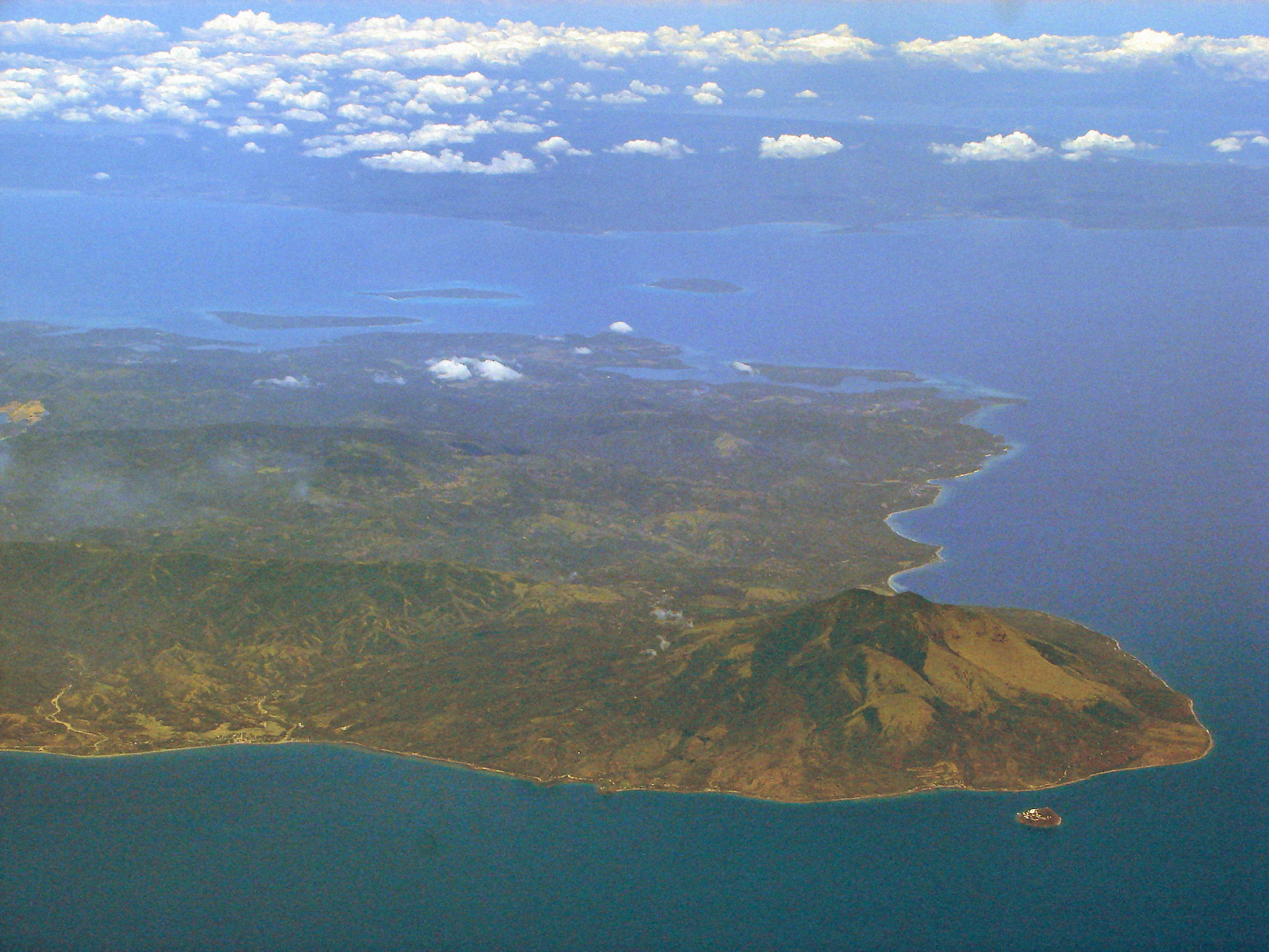 Marinduque, Philippines